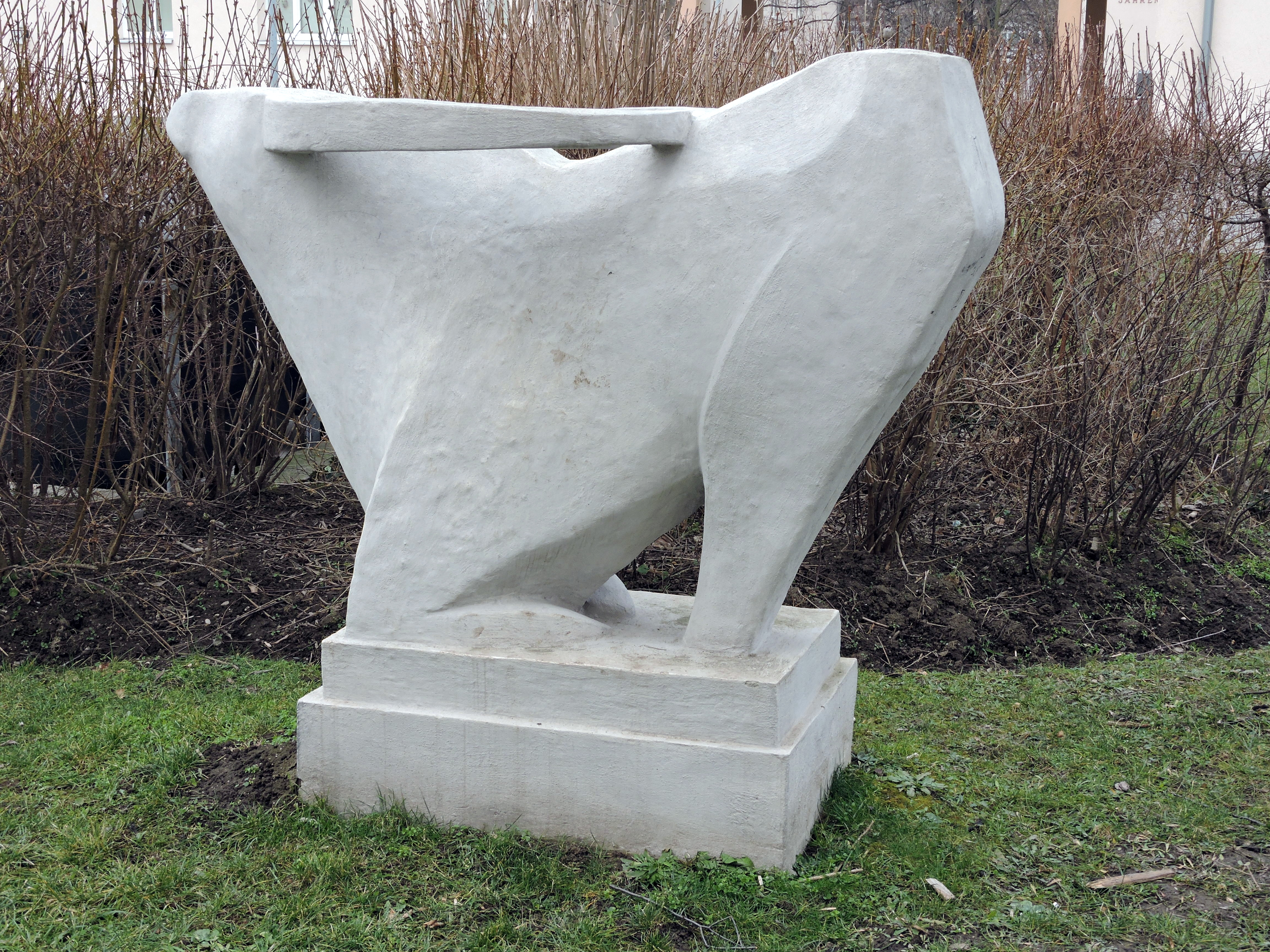 Kniender Wasserbüffel